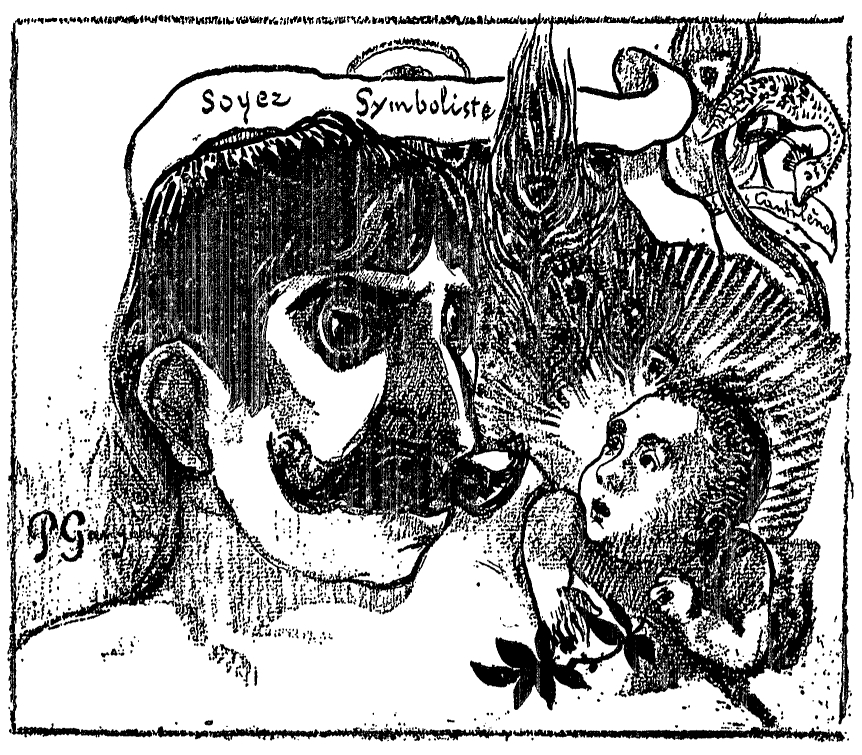 Soyez symboliste. Composition par Paul Gauguin (1848-1903) pour La Plume avec le portrait de Jean Moréas (1856-1910)